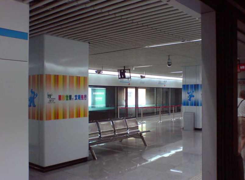 杨思站站台